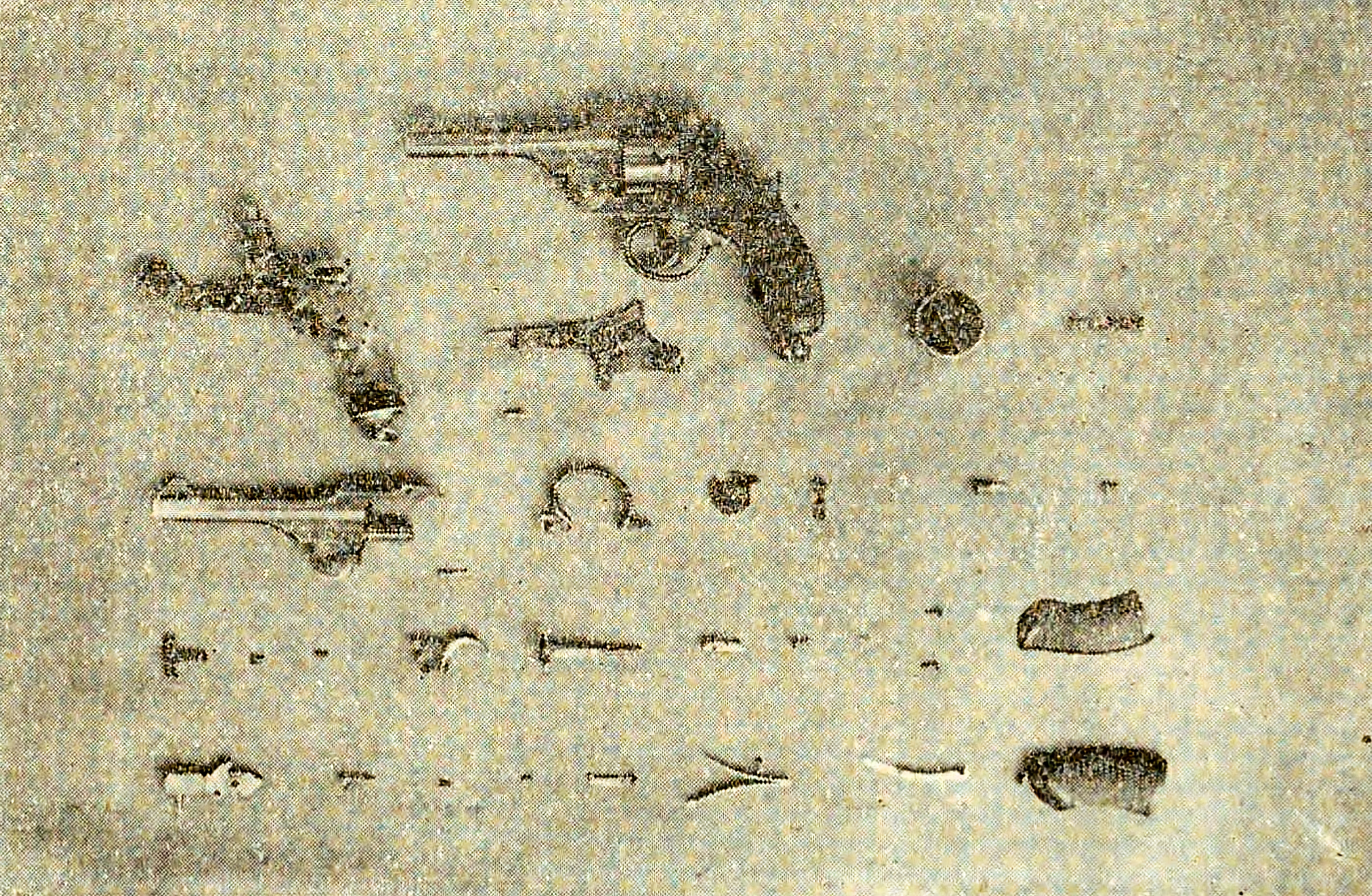 二十六年式拳銃および同拳銃の部品。